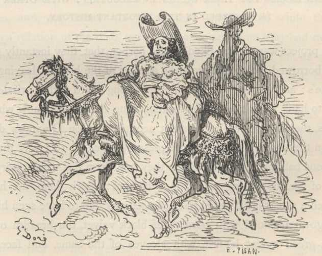 Ilustração de Gustave Doré para a edição de 1863 de "Dom Quixote" de Miguel de Cervantes